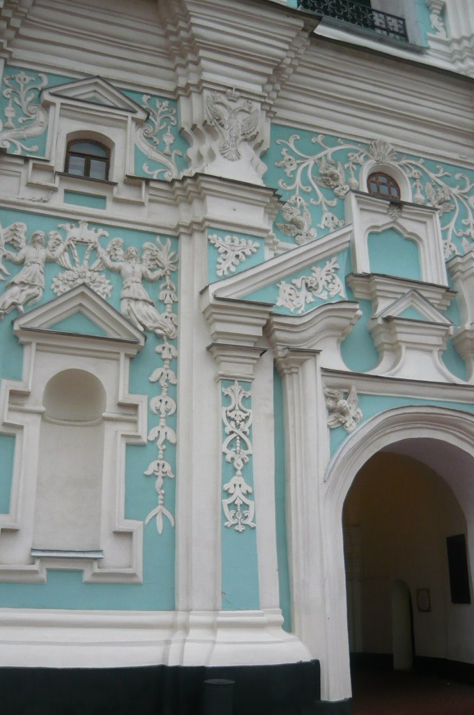 Фрагмент декора Звонницы в Софийском соборе Киева